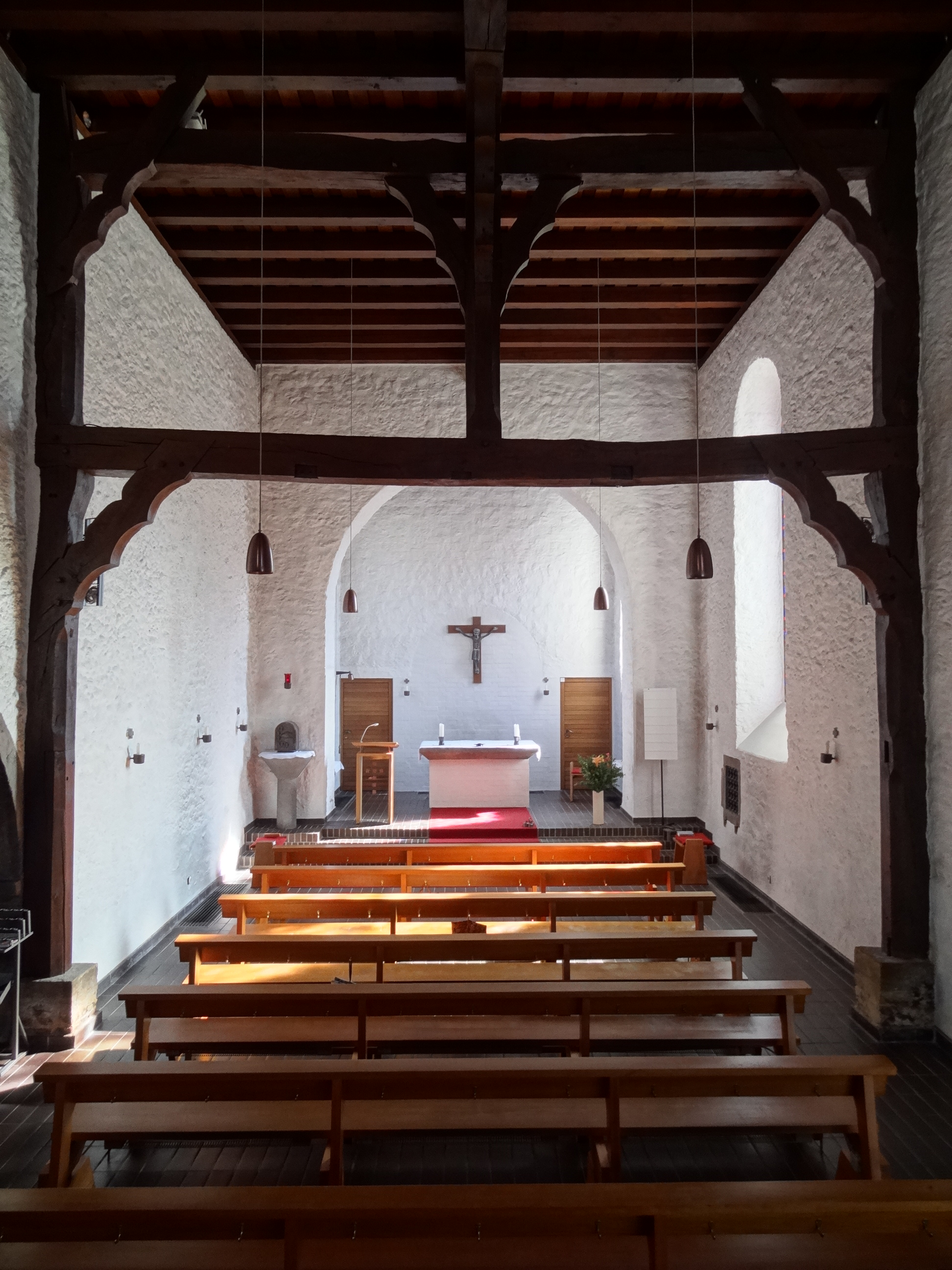 St. Nikolaus (Münzenberg)